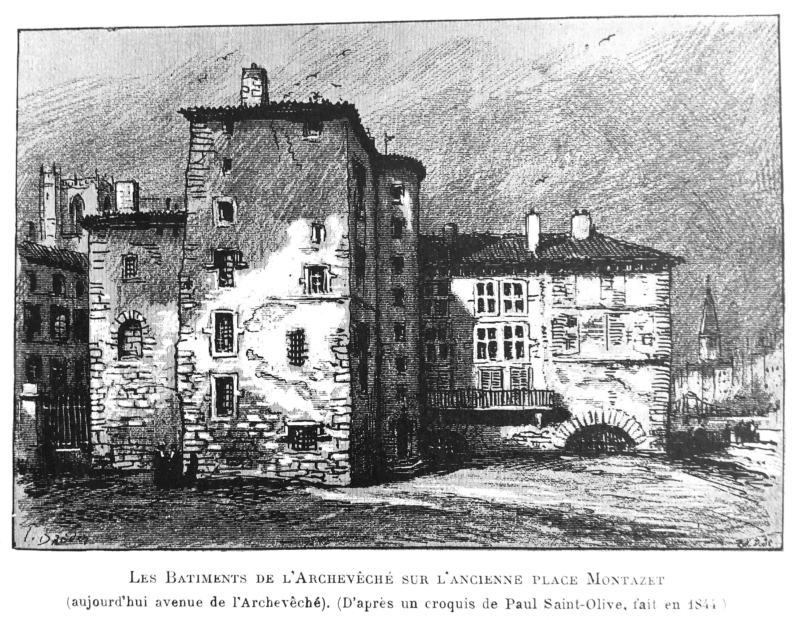 Livre Le Lyon de nos pères, Emmanuel Vingtrinier et Joannès Drevet, 1901, page 44 (Rougeron-Vignerot-Demoulin, Joannès Drevet et Paul Saint-Olive) : les bâtiments de l'Archevêché sur l'ancienne place Montazet (aujourd'hui avenue de l'Archevêché). (D'après un croquis de Paul Saint-Olive, fait en 1844). Bibliothèque municipale de Lyon.